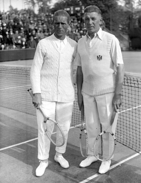 Karl Kozeluh und Roman Najuch die beiden ausgezeichneten Tennis-Professionals kämpfen m Sonntag am Hundekehlensee in Berlin! Die beiden Tennismeister Karl Kozeluh (links) und Roman Najuch (rechts).